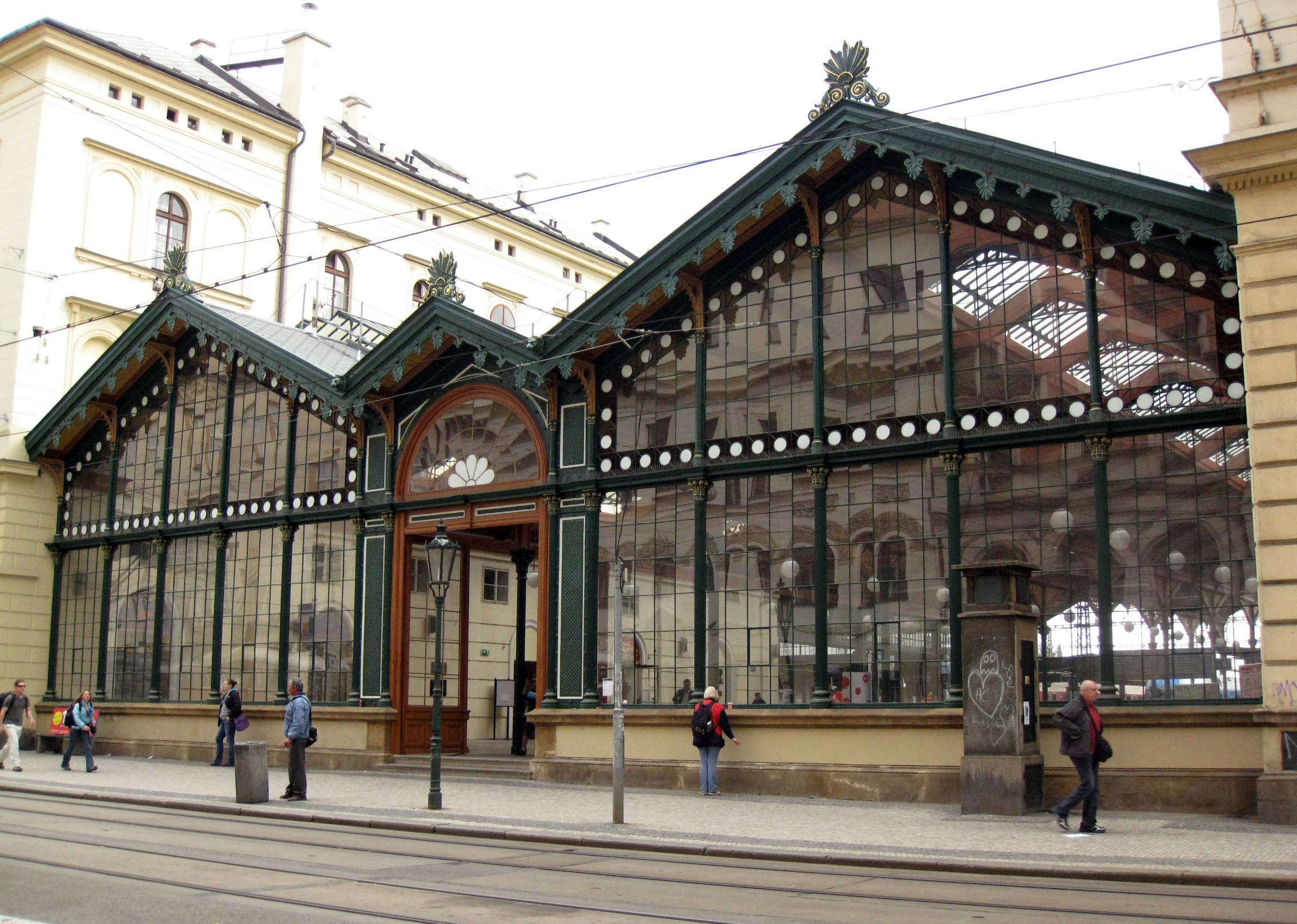 Masarykovo nádraží, Praha 1, Praha 8, Hybernská 2086/15, Hybernská 1014/13 Havlíčkova 1014/2, Na Florenci, Husitská